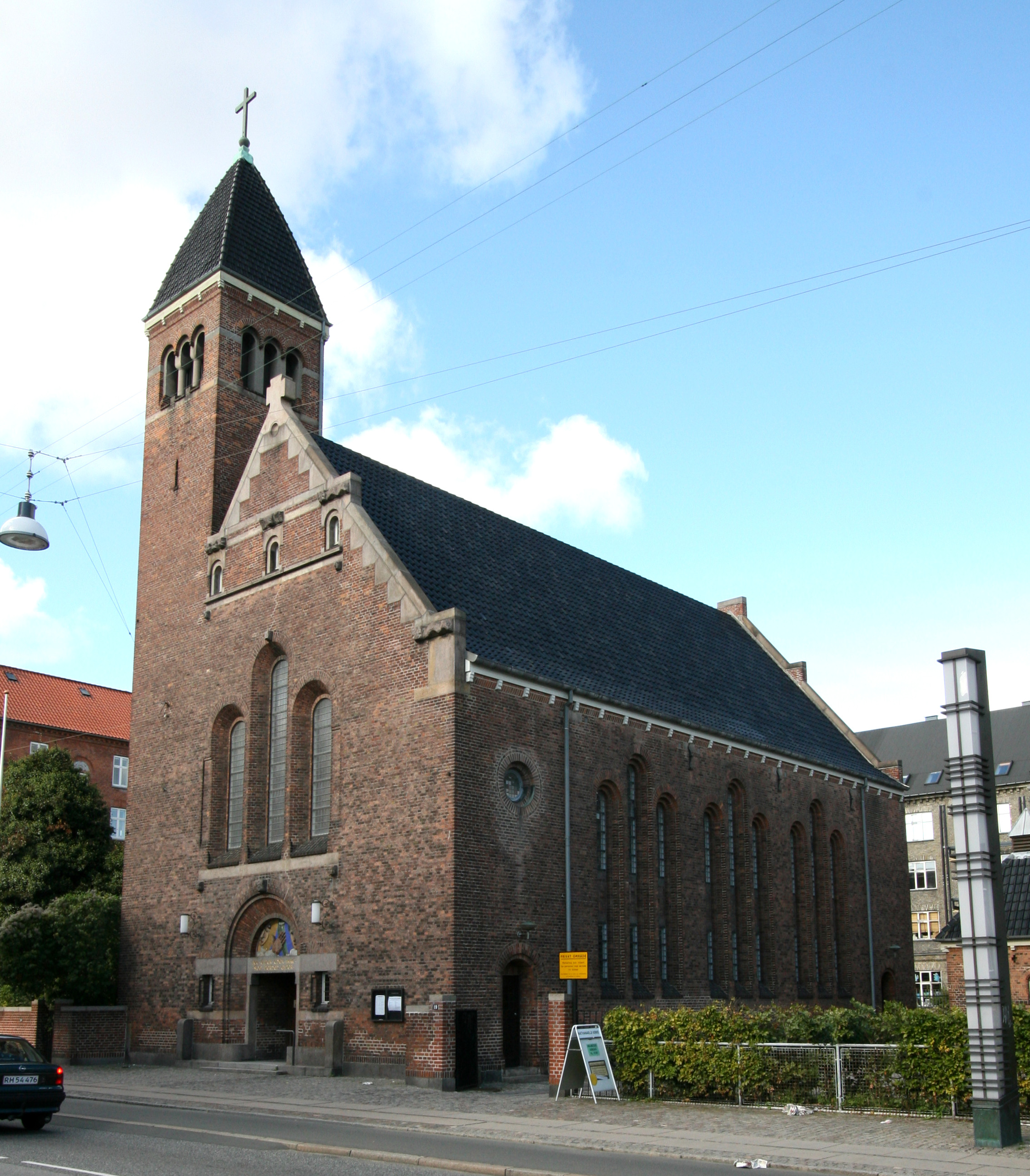 Nathanaels Kirke, Amager, Copenhagen, Denmark. Nathanaels Kirke